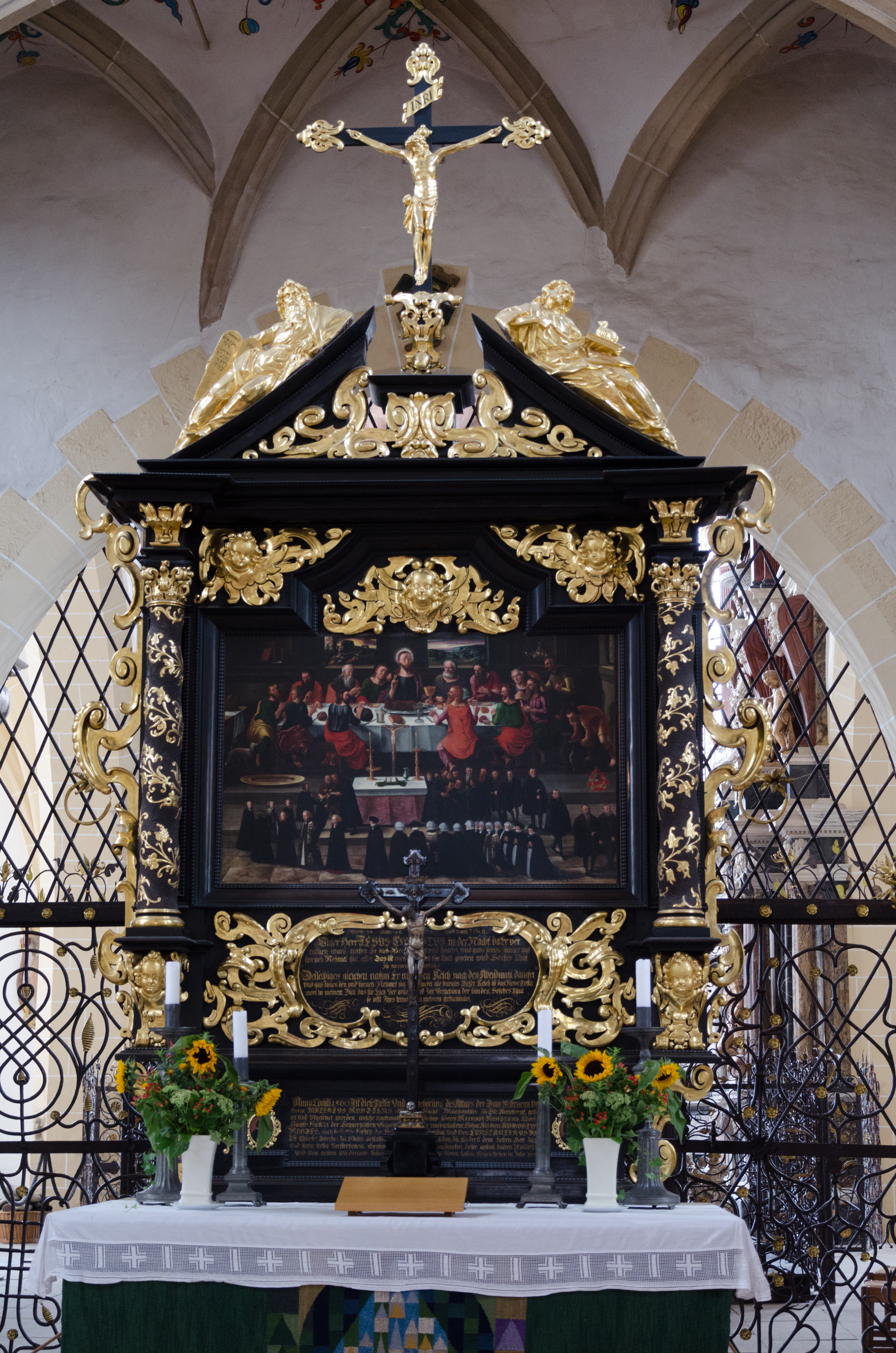 Freiberger Dom